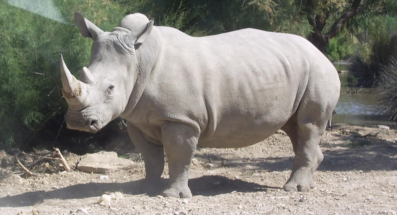 Rhinoceros blanc